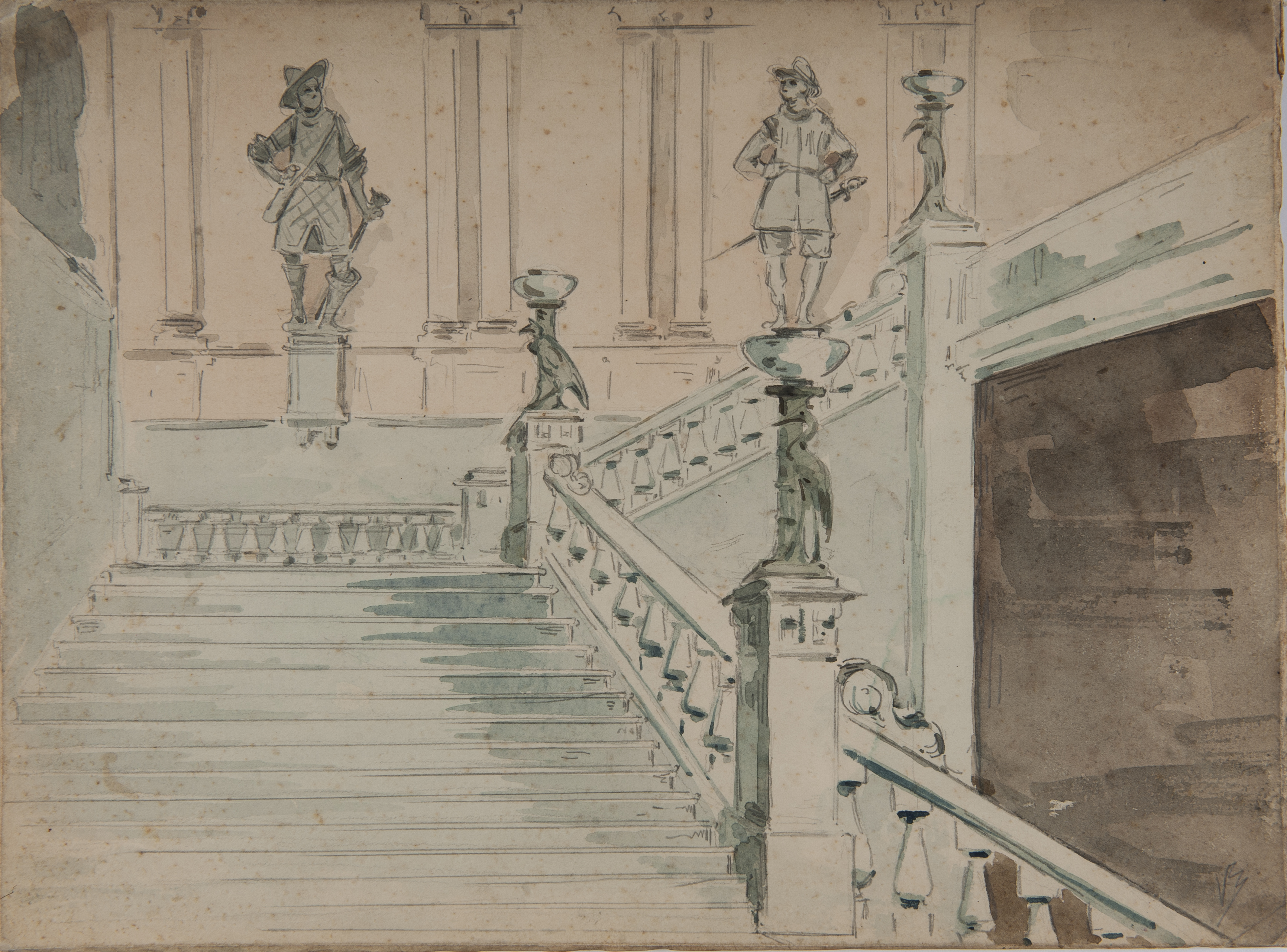 Obra que integra o acervo do Museu Paulista da USP.